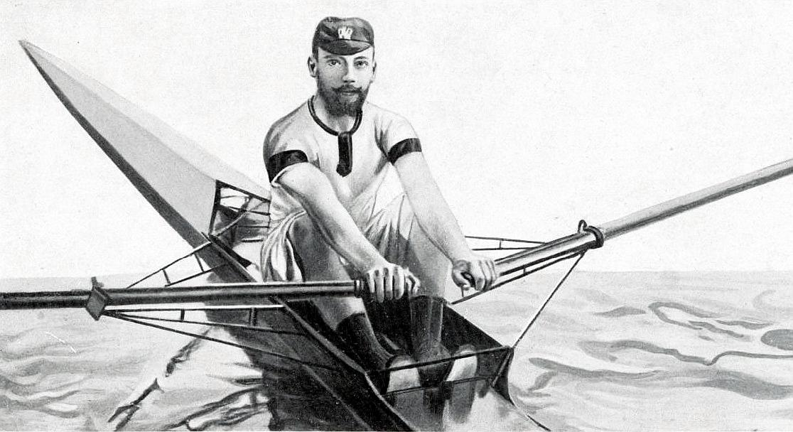 Alexandre Lein, vers 1880.